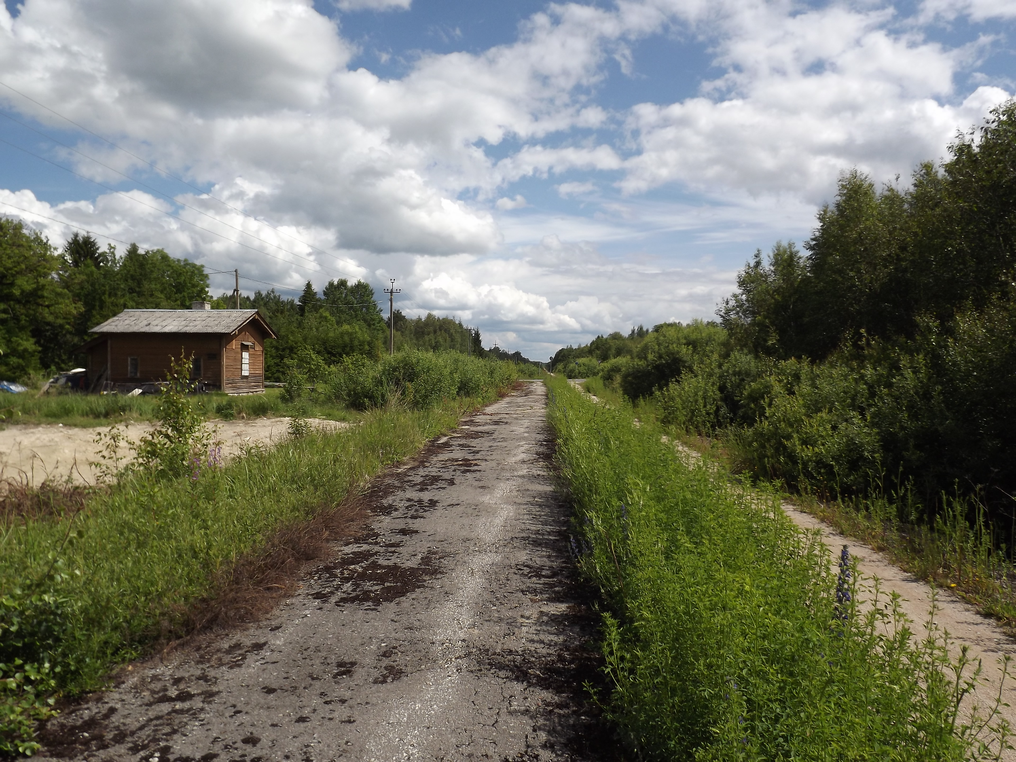 Endine Ridala raudteepeatus.